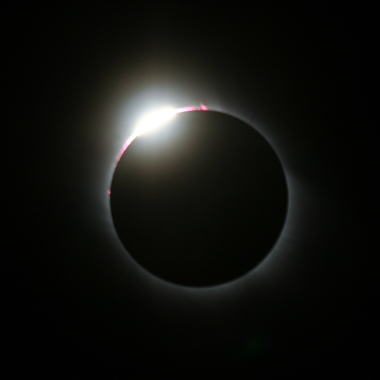 Kurz vor Beginn der totalen Phase der Sonnenfinsternis am 29. März 2006 erschien ein prächtiger Diamantringeffekt. Die Aufnahme entstand in Side, Südtürkei. Publiziert in der Fachzeischrift ORION der Schweizerischen Astronomischen Gesellschaft SAG